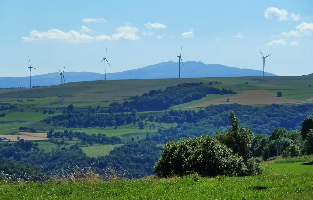 Éoliennes sur le Puy de Matonière (Monts du Cézallier). En arrière plan, les Monts du Cantal - Auvergne - France